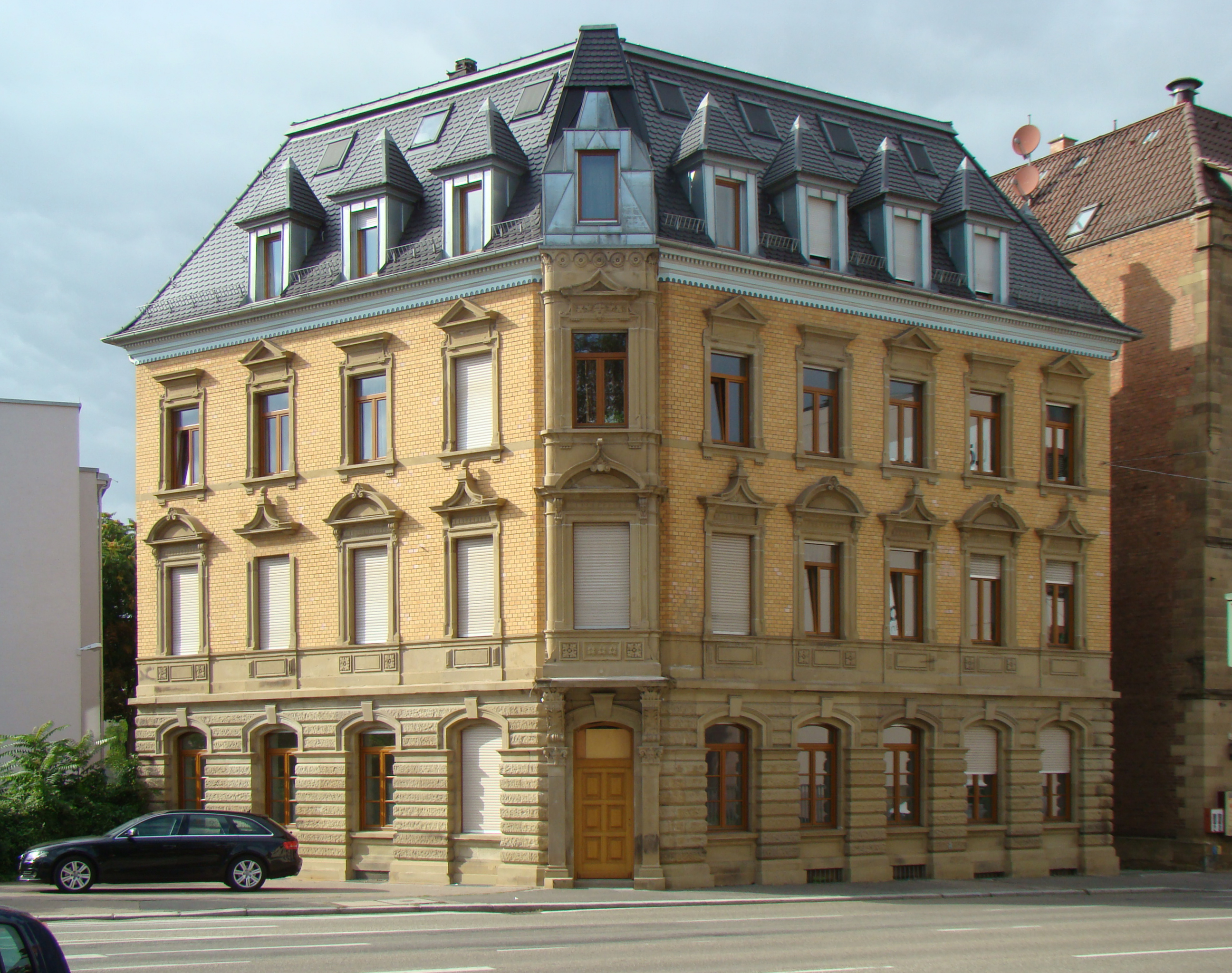 Wilhelmstraße 68 in Heilbronn, vgl. Denkmaltopographie Ba-Wü I.5 Heilbronn (2007), S. 140